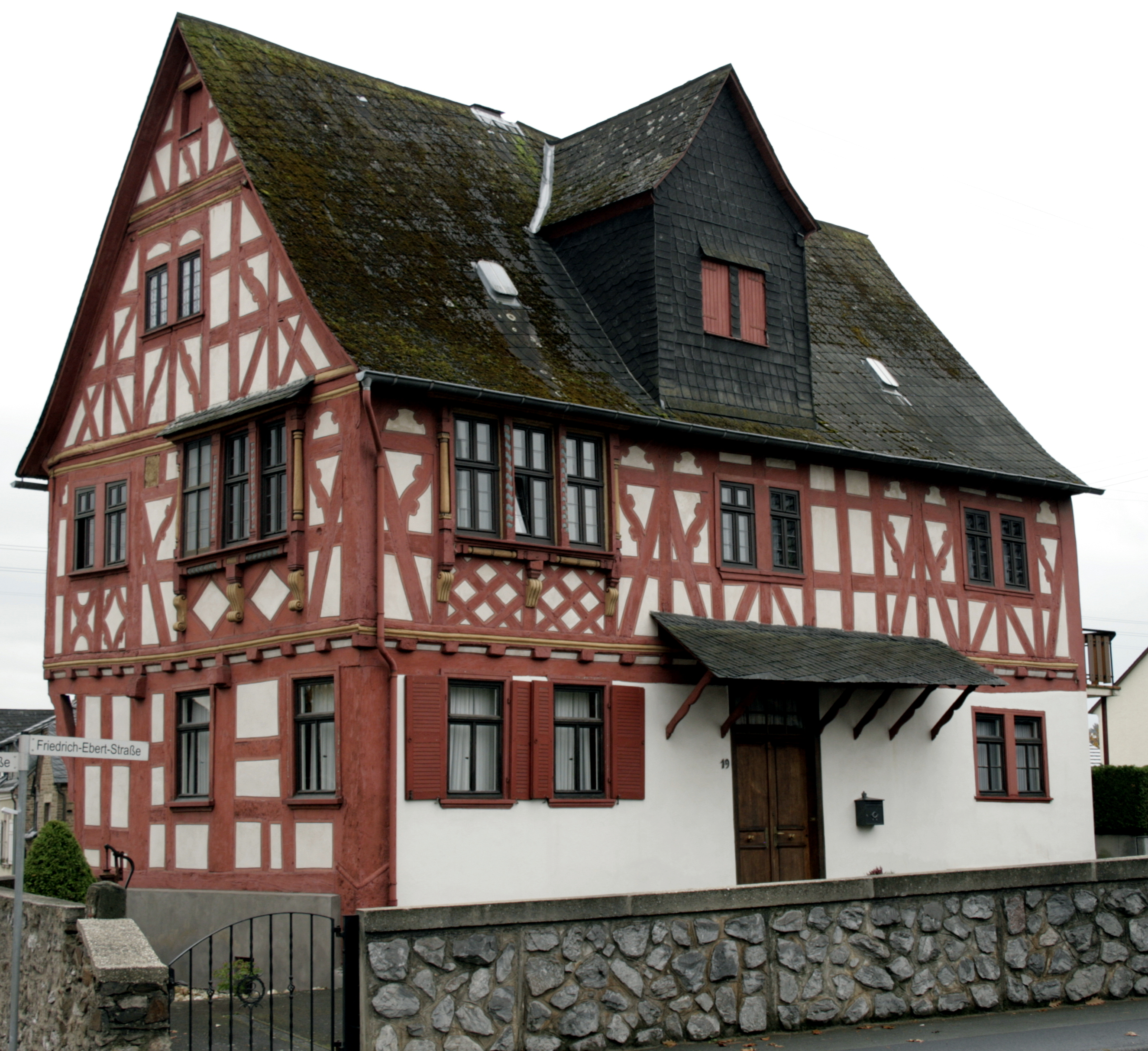 Adelshof "Bausche Haus" Haus, Bücherei, in Elz, Deutschland